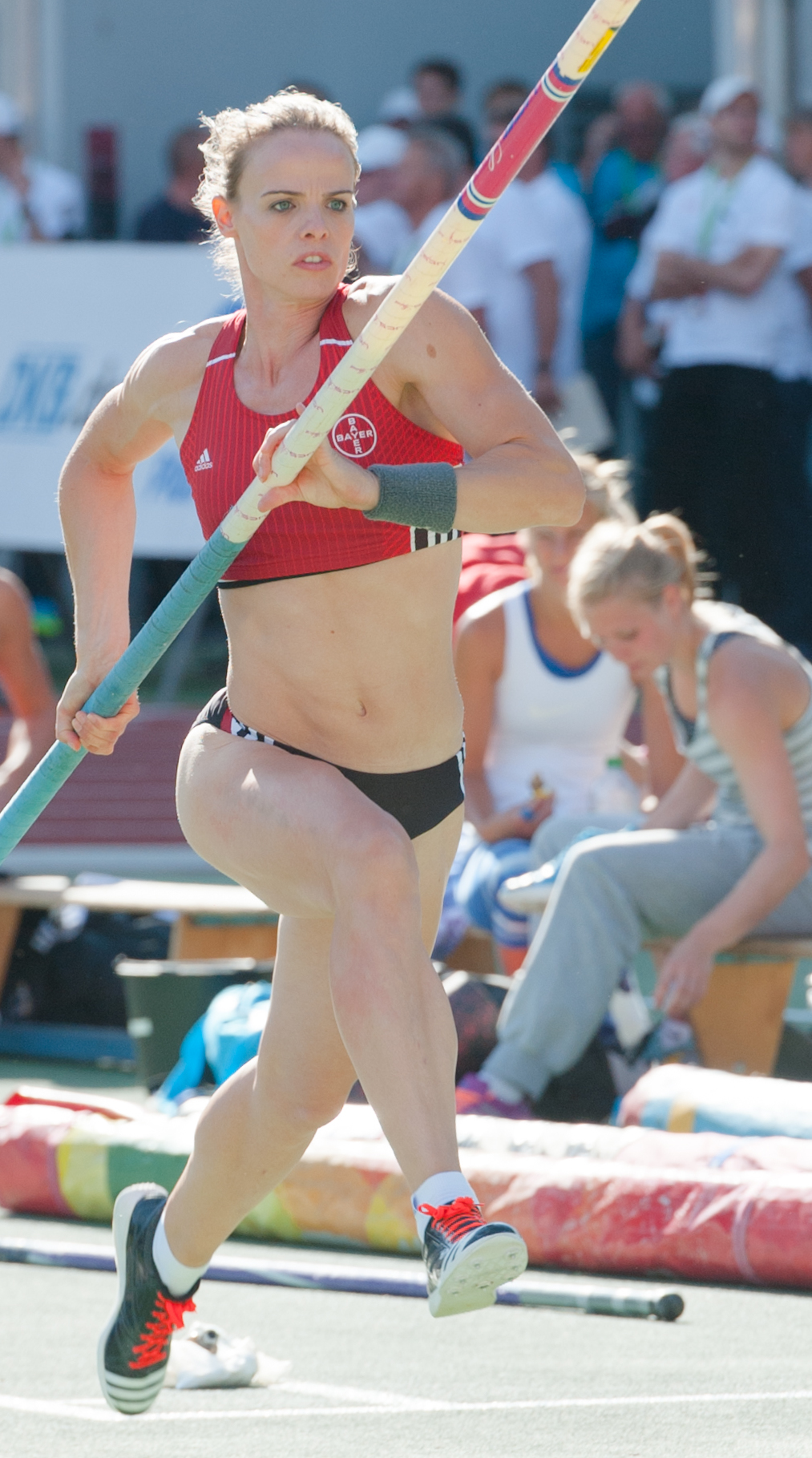 Deutsche Leichtathletik-Meisterschaften 2015: Frauen Stabhochsprung - Silke Spiegelburg, TSV Bayer 04 Leverkusen